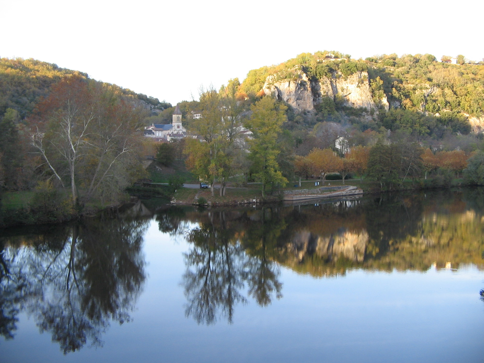 Vers au bord du Lot en novembre 2012